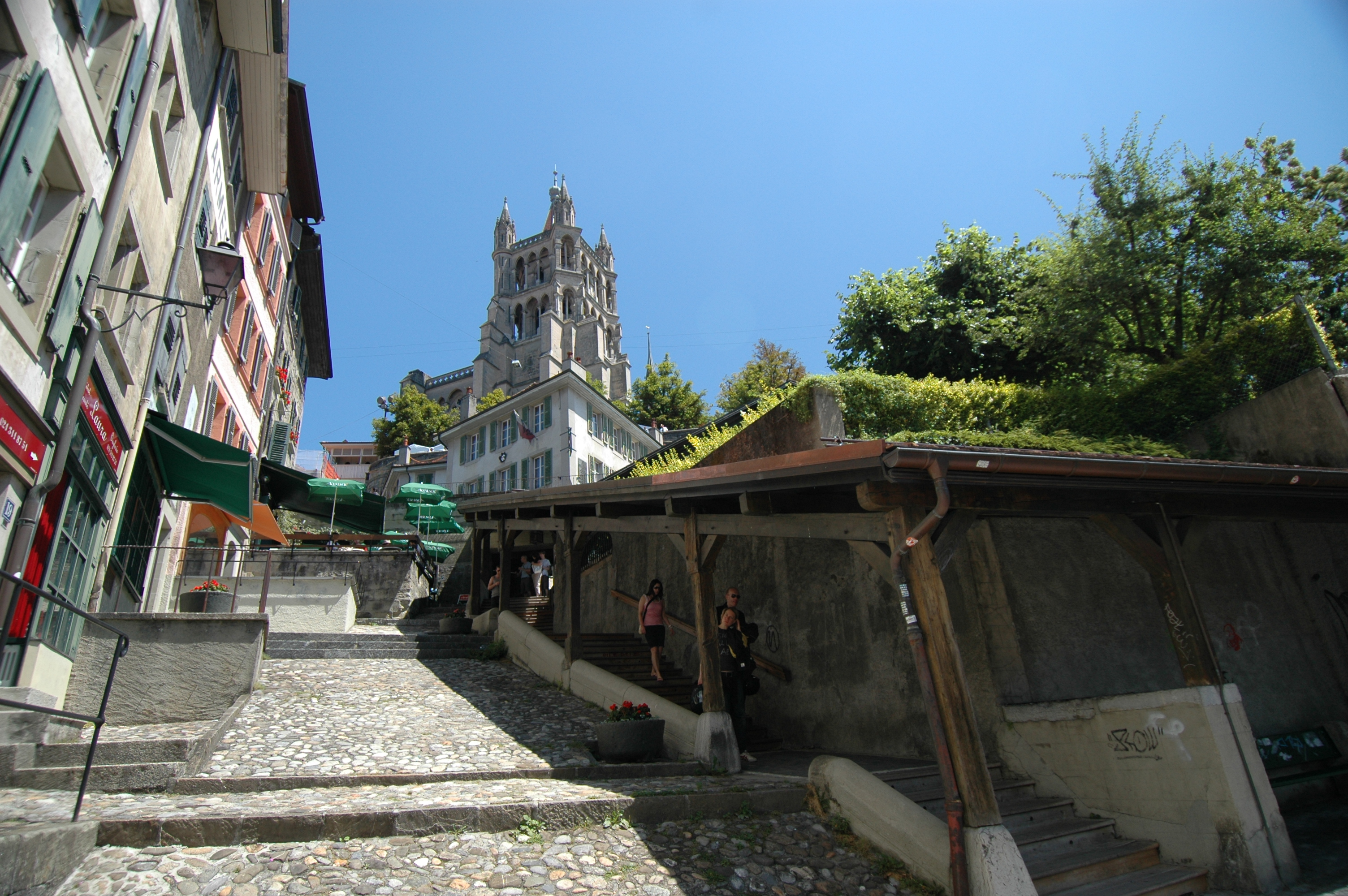 La Cathédrale de Lausanne et les Escaliers du Marché